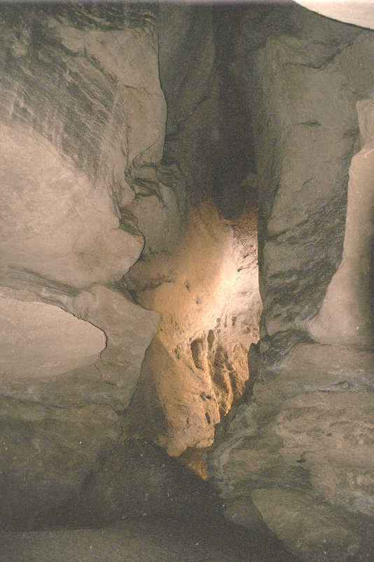 Cueva en el Karst en Yesos de Sorbas, cerca de la entrada del cauce. Tomada por --JMSE el 21 de junio de 2003 y cedida a Wikipedia